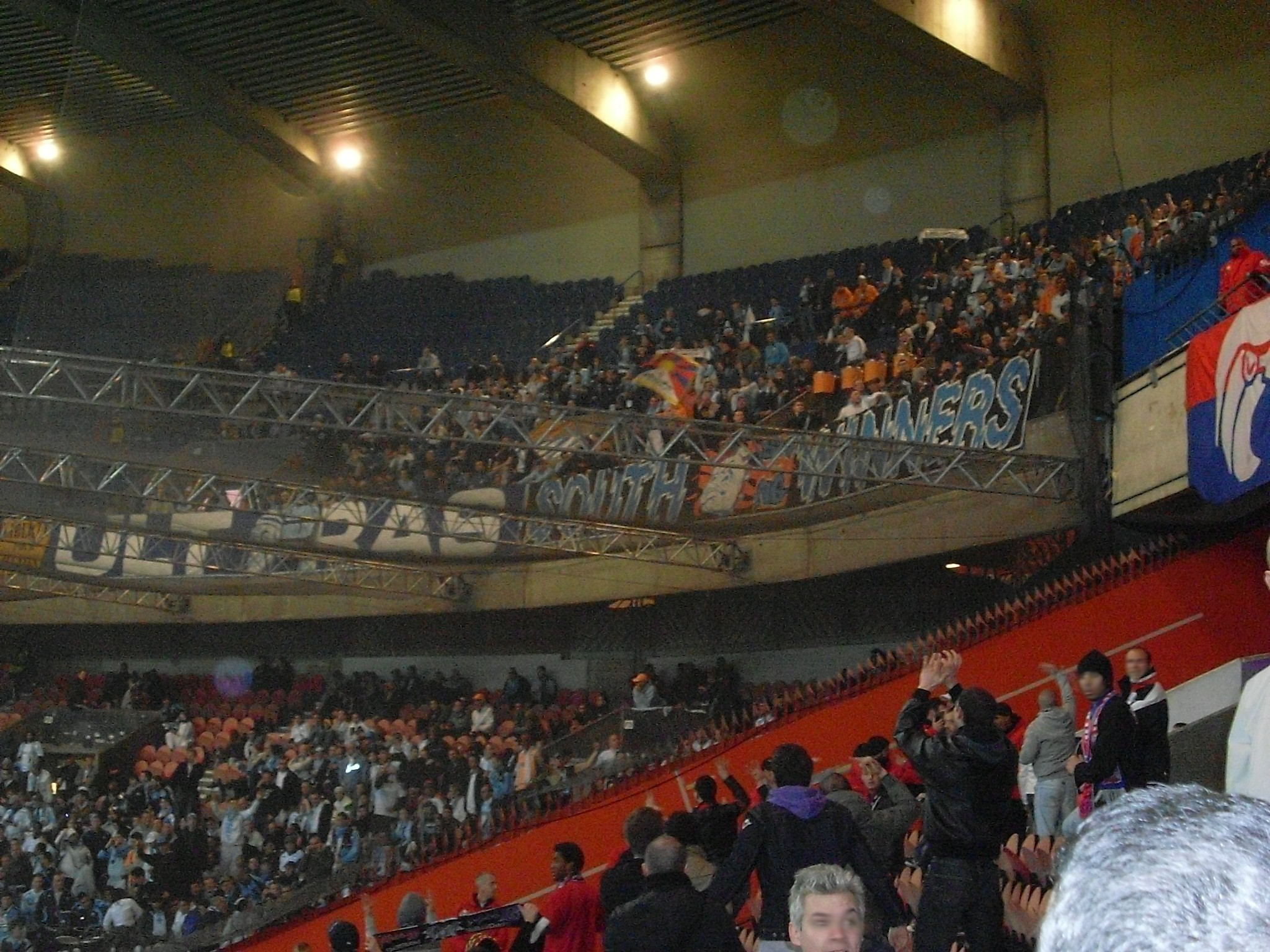 Arrivée des supporters marseillais au Parc des Princes lors du match Paris SG-Olympique de Marseille du 13 mars 2009.